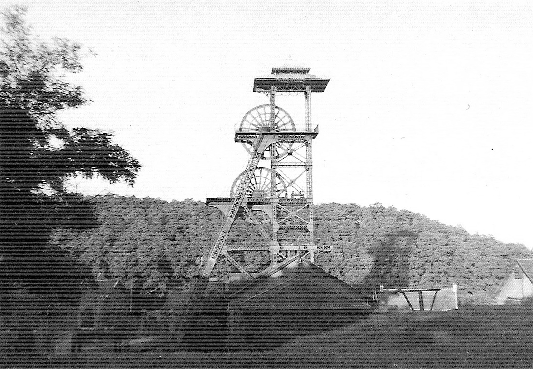 La fosse Casimir-Perier de la Compagnie des mines d'Anzin était un charbonnage constitué d'un seul puits situé à Somain, Nord, Nord-Pas-de-Calais, France.